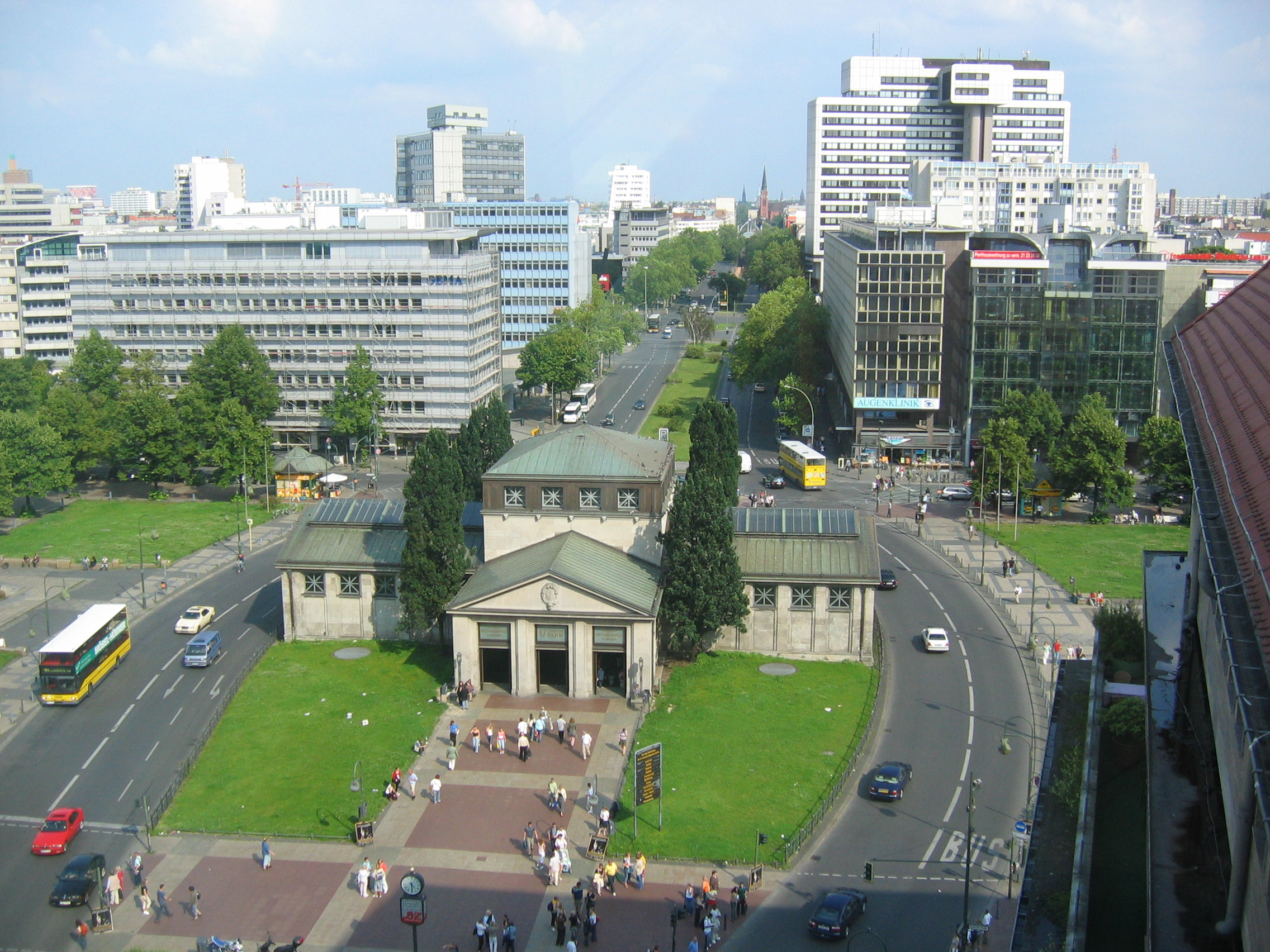 Der Wittenbergplatz in Berlin vom KaDeWe aus geschossen.